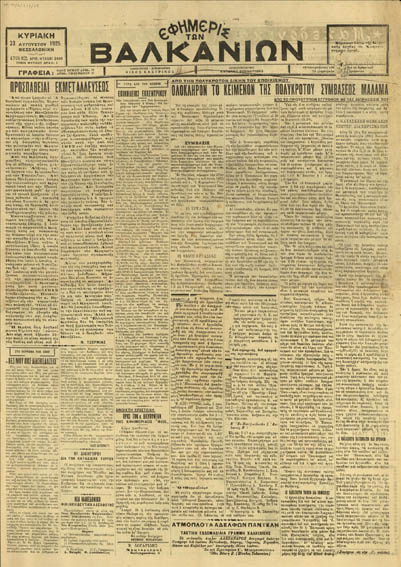 Първа страница на вестник "Ефимерис тон Валканион", 19 август 1928 година.